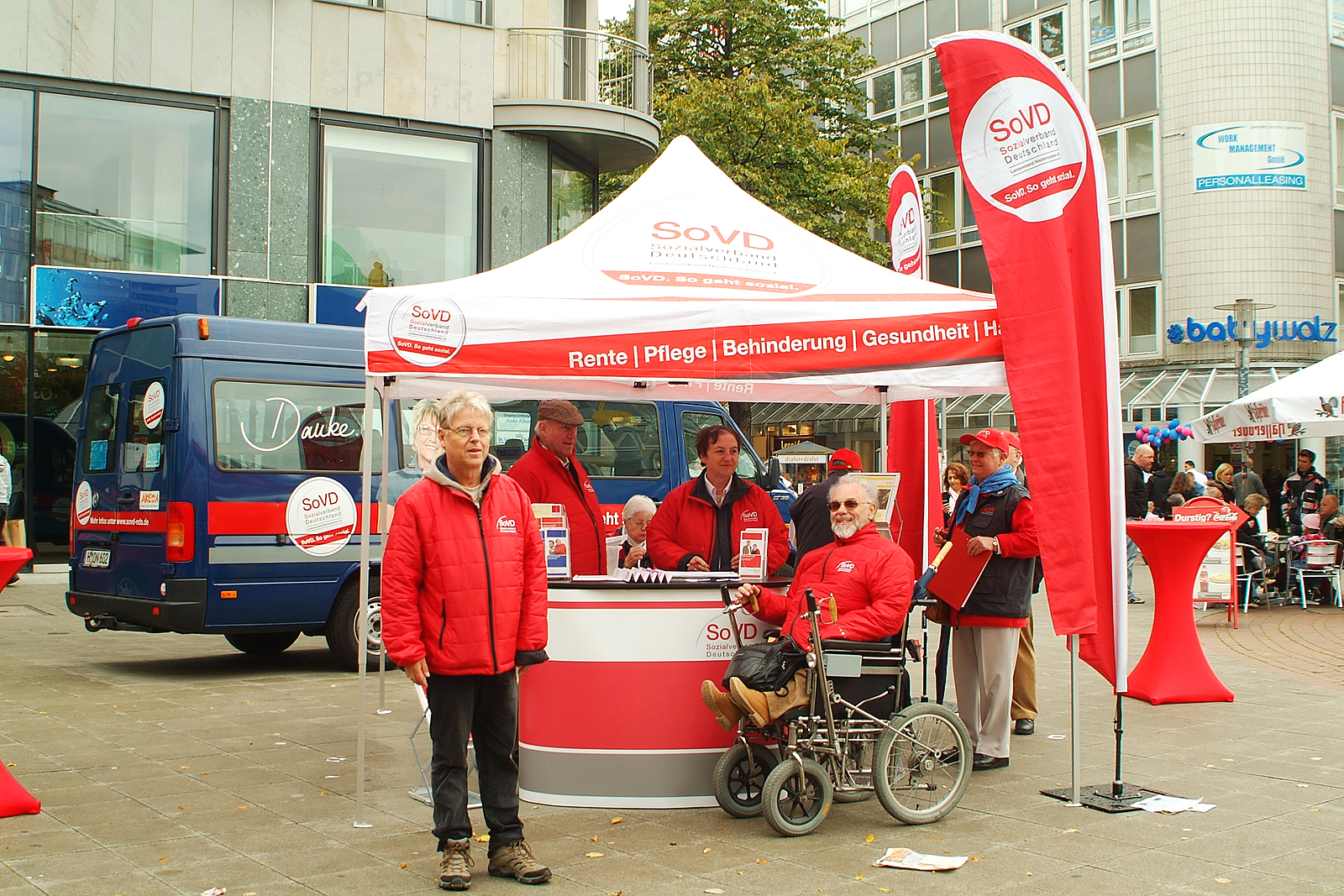 Der Informationsstand des Sozialverbands Deutschland (SoVD) nahe dem Schillerdenkmal in der Georgstraße von Hannover. Unter dem Motto "So geht sozial" hält er hier mit zahlreichen MitarbeiterInnen eigene Informationen zu den Themen Rente, Pflege, Behinderung, Gesundheit und Hartz IV vor, hier während des bundesweiten Aktionstags "UmFAIRteilen - Reichtum besteuern" ...